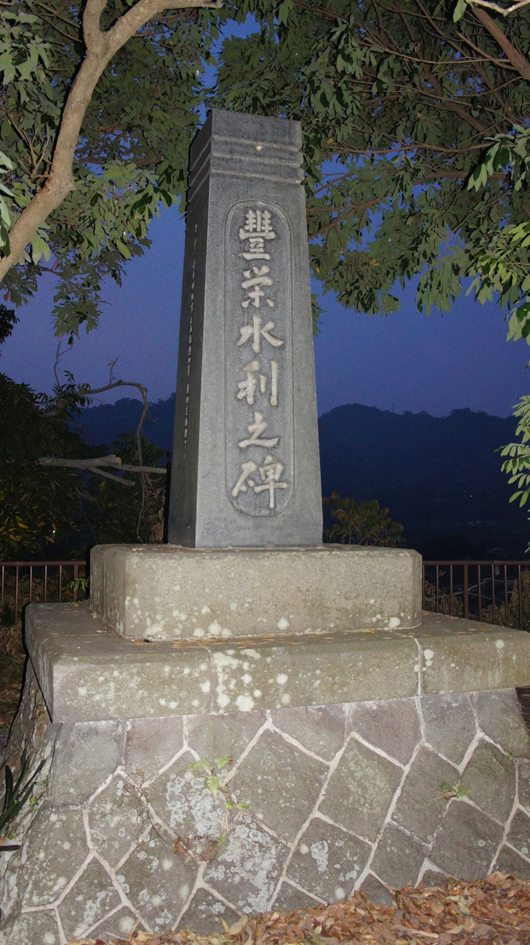 臺中市豐原區豐榮水利之碑。